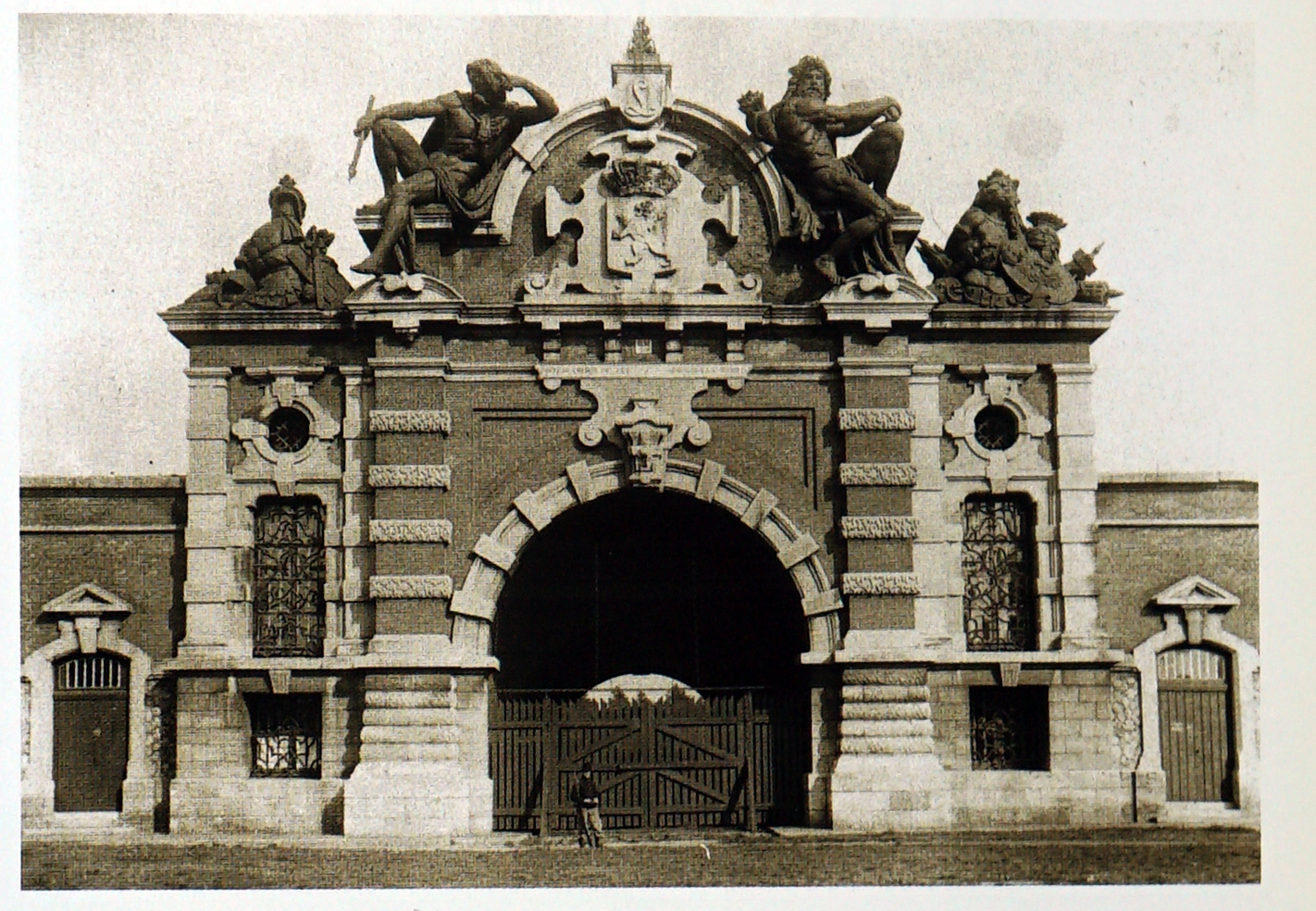 Statues et décorations en tôle bronzés fabriquées par la compagnie des bronzes de belgique, vue de l'ancienne enceinte fortifiée d'Anvers.